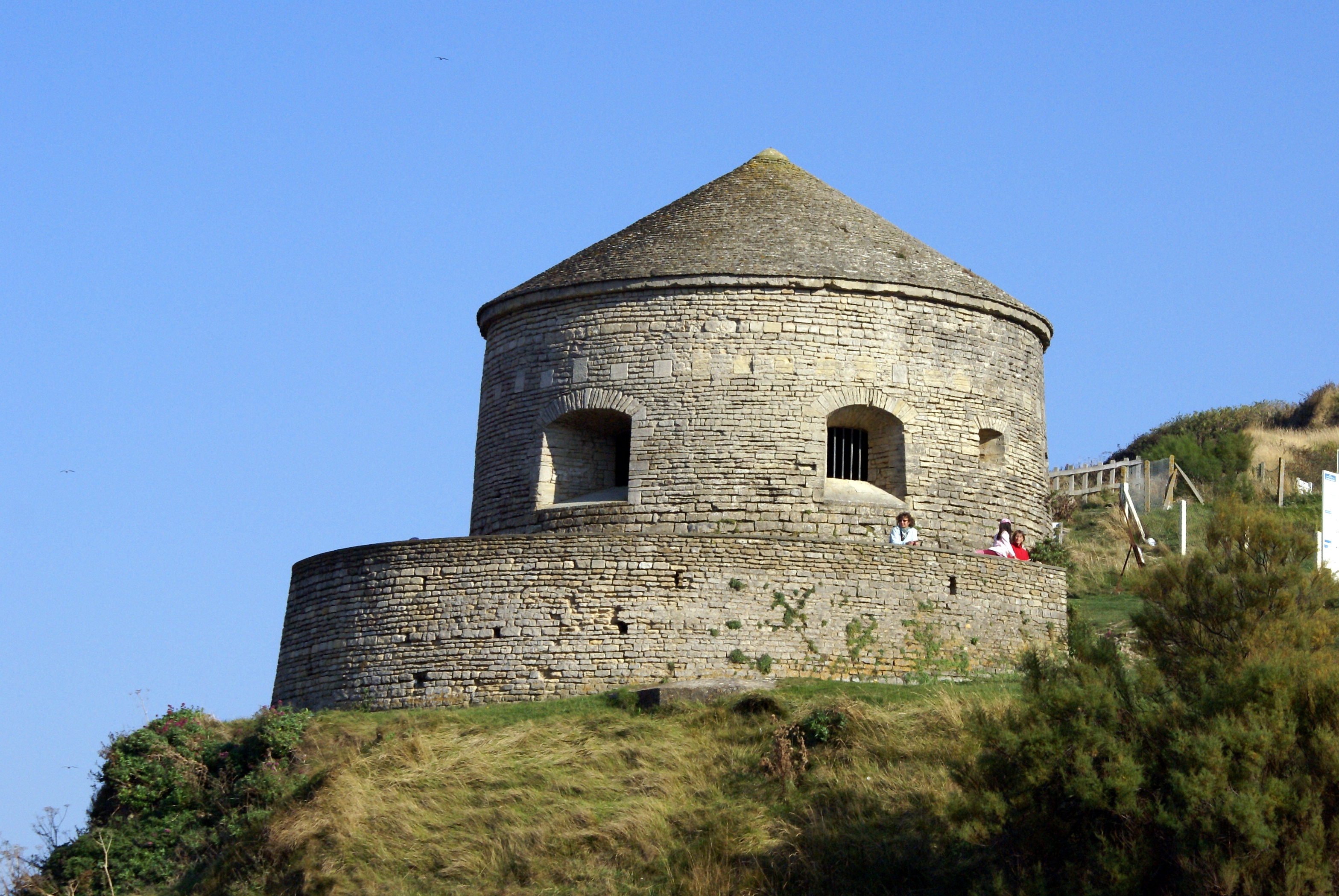 Tour Vauban, construite par Benjamin de Combe en 1694, qui surplombe le port de Port-en-Bessin-Huppain